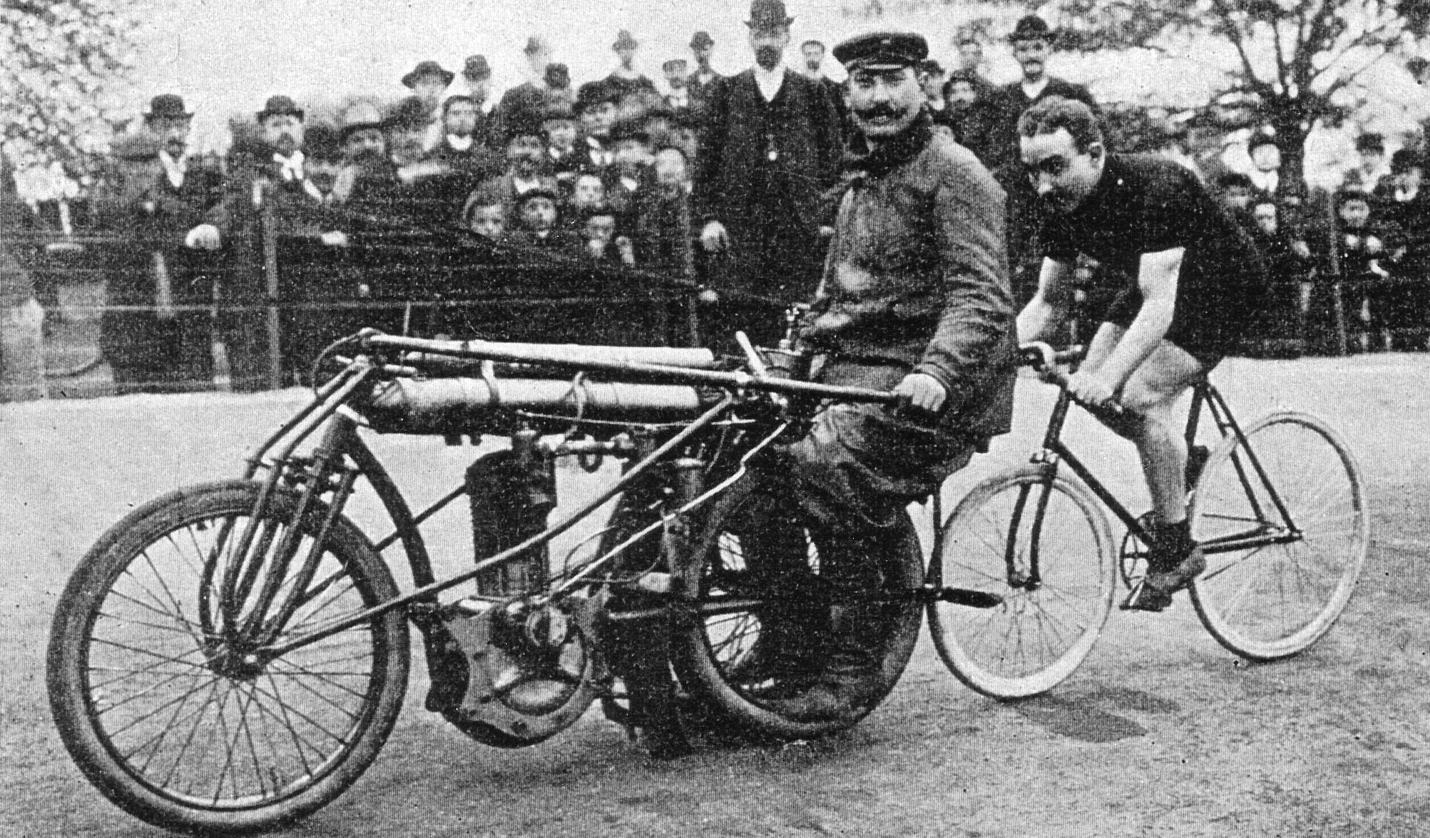 Peter Günther, deutscher Radsportler, mit Schrittmacher Heinrich Otto